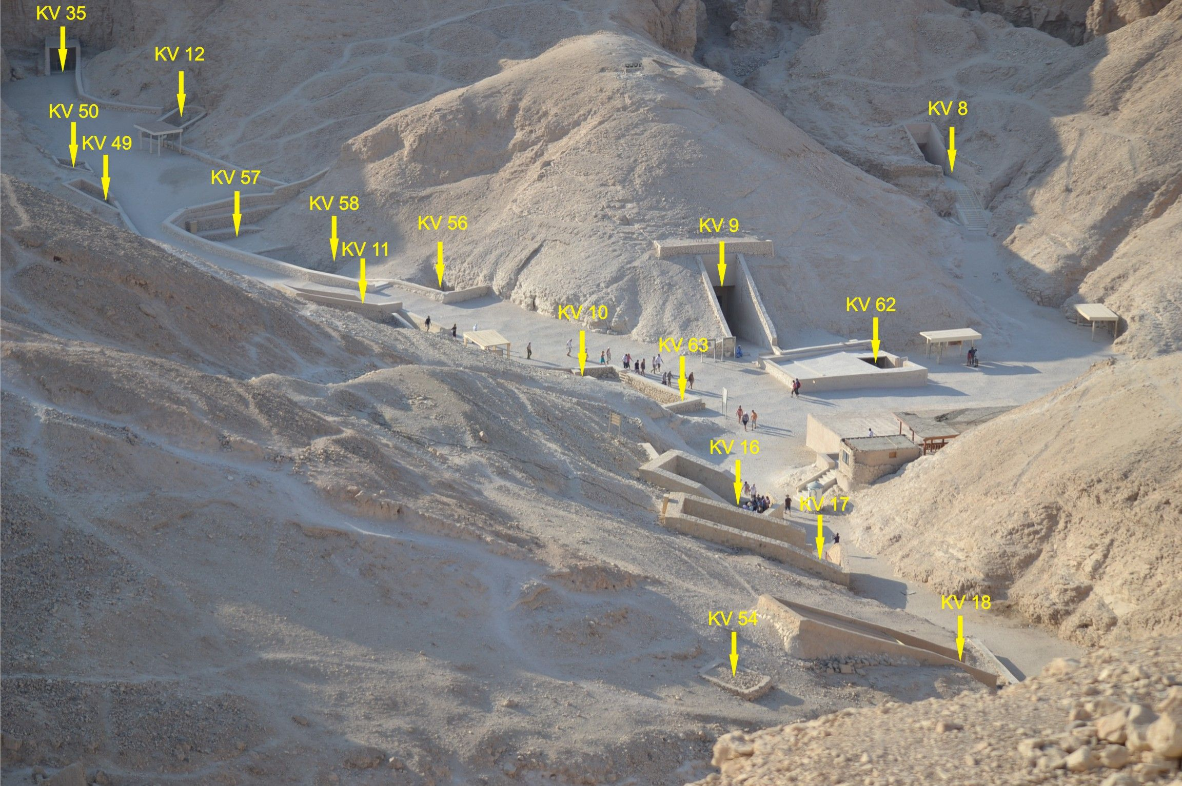 Királyok völgye (keleti völgy középső részének sírjai), Luxor, Egyiptom